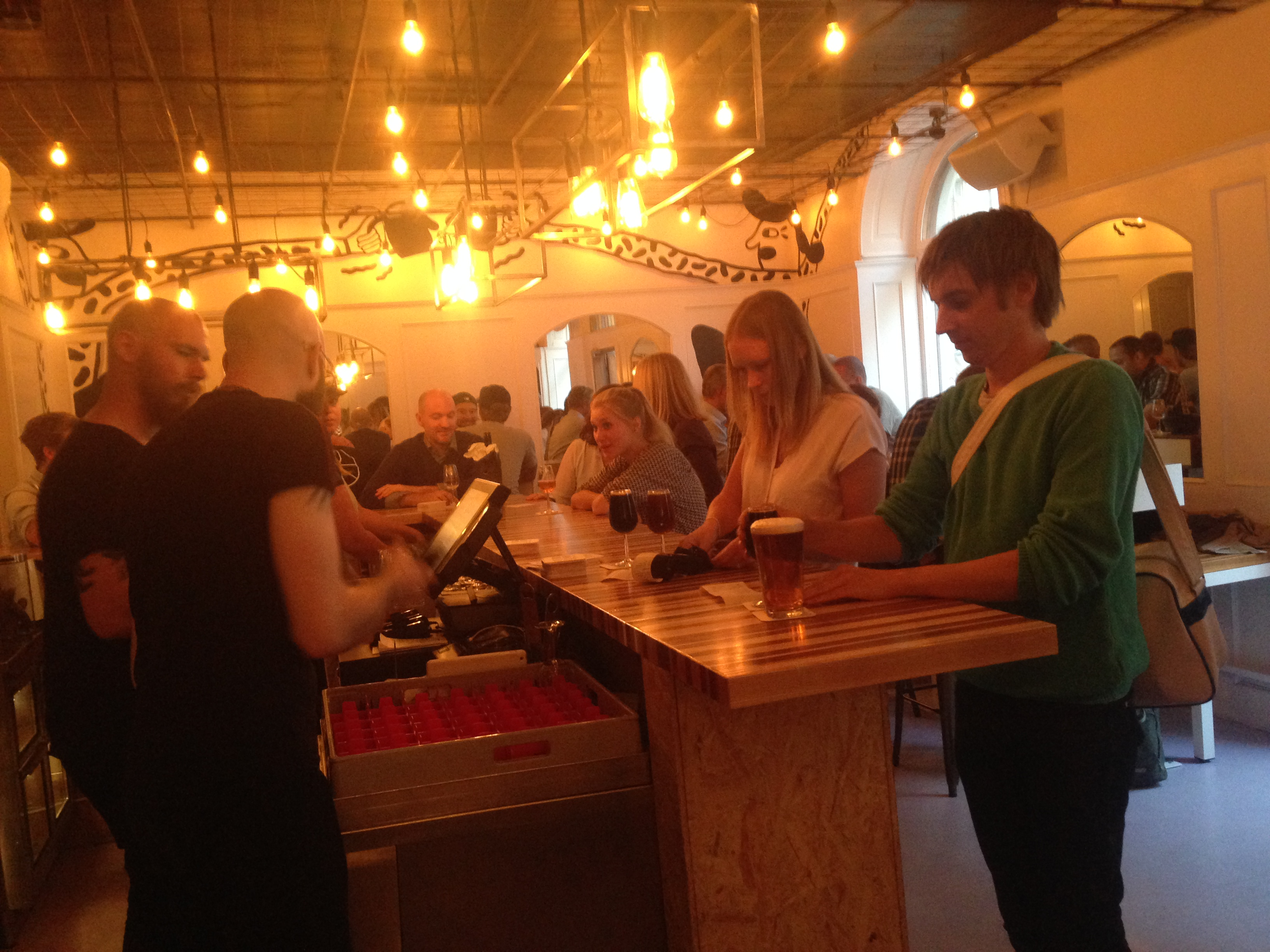 Mikkeller bar, Döbelnsgatan 25 Stockholm